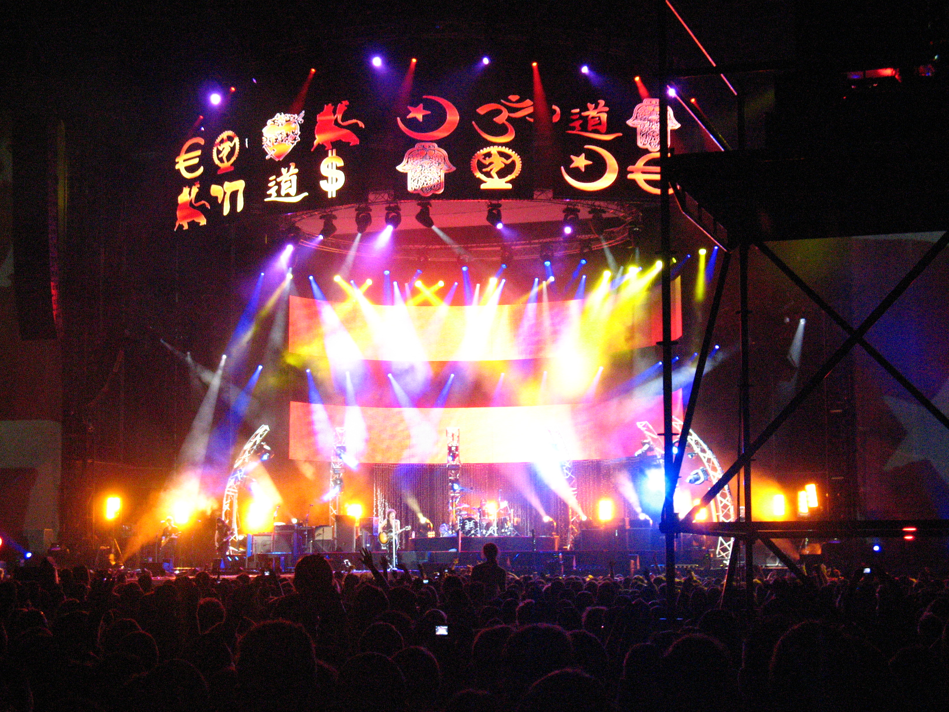 Heroes del Silencio Estadio Olimpico de Sevilla Oct 07